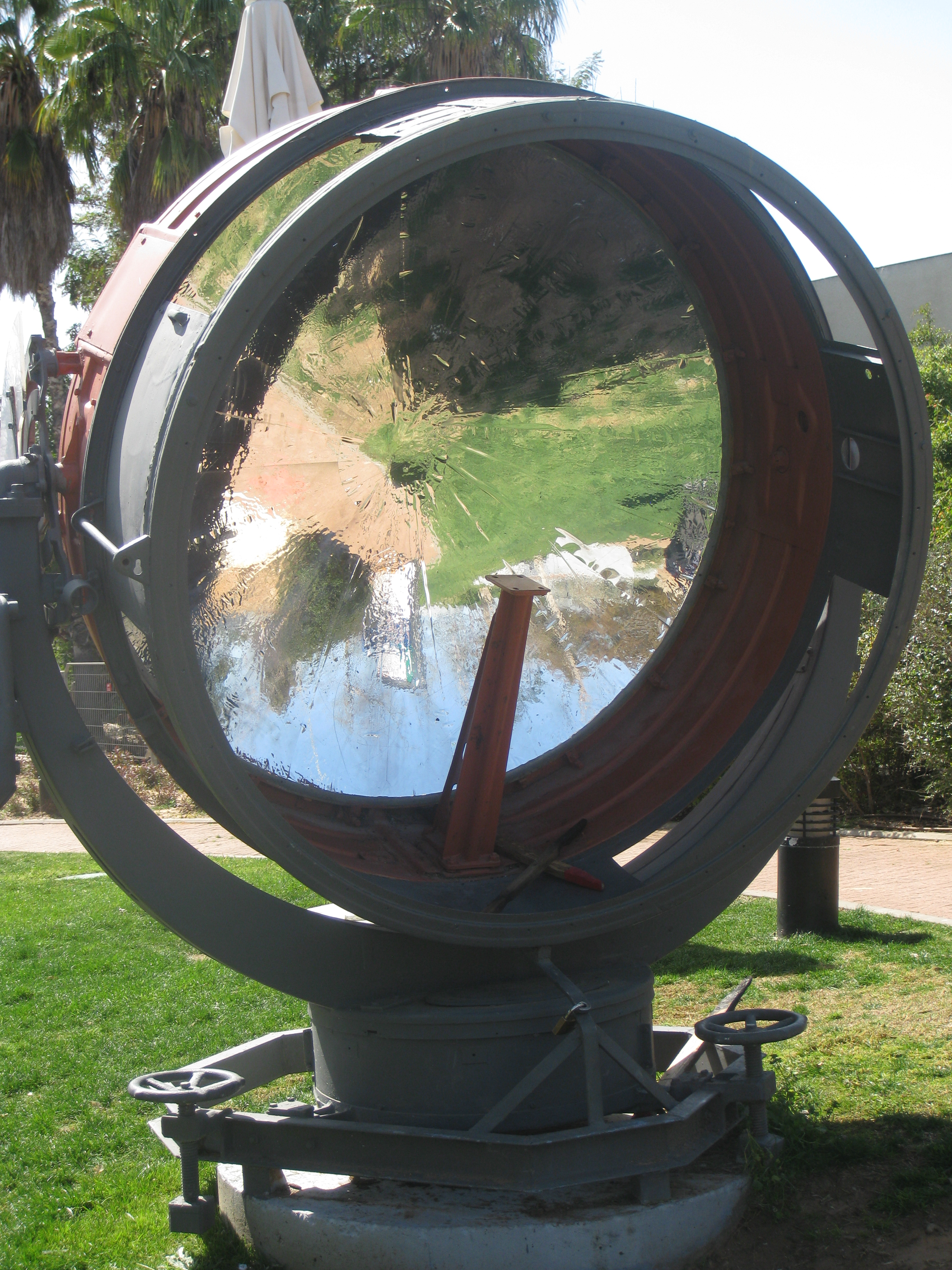 The Weizmann Institute - Clore Garden of Science - מכון ויצמן - גן המדע על שם קלור Sun Oven